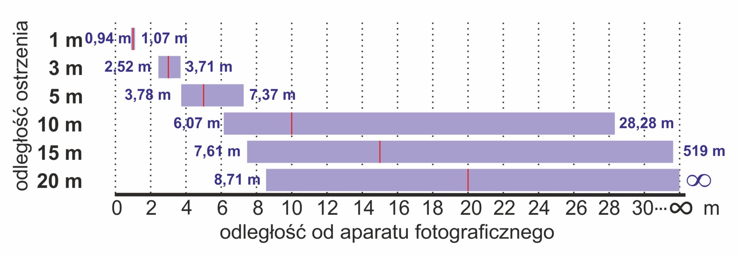 Wykres ilustrujący wpływ odległości ostrzenia na głębię ostrości (matryca full frame, ogniskowa 50 mm, przysłona f/5.6)